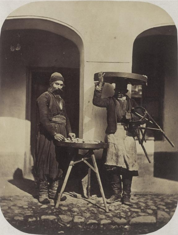 Македонски царевичари (арумънци) продават печена царевица в Румъния